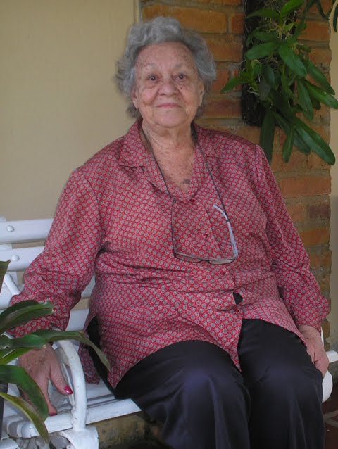 iagem D. Alda Bernardes